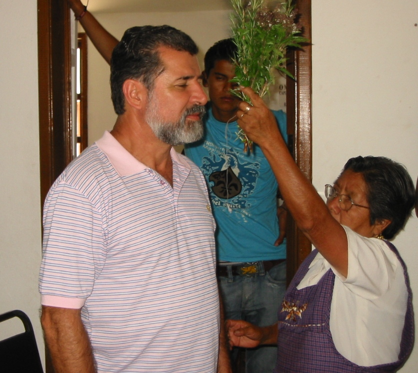 Centro de Medicina Tradicional Indígena en Capulálpam de Méndez, atención a locales y turistas